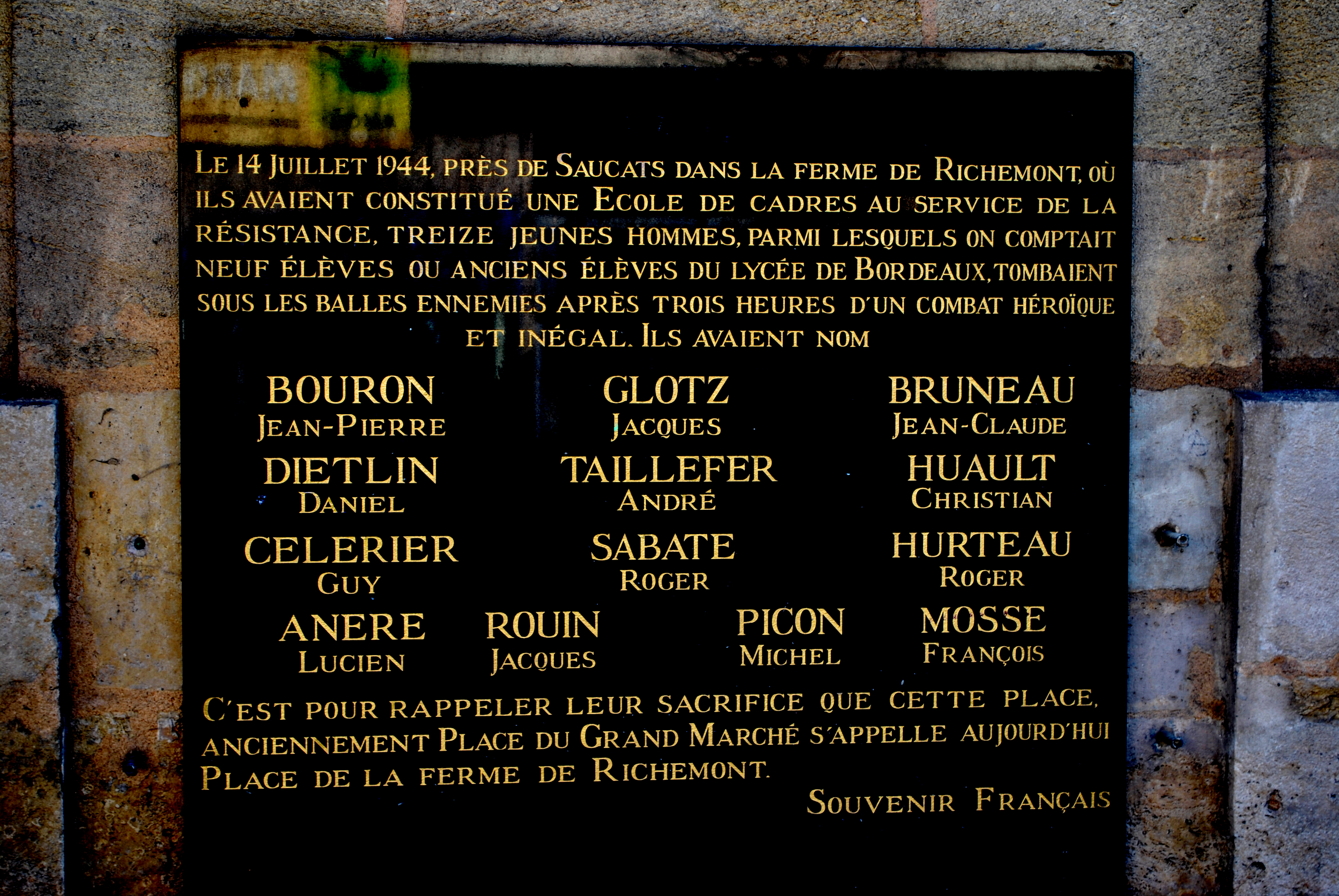 Saucats Mémorial de la Ferme Richemont au Lycée Michel-Montaigne